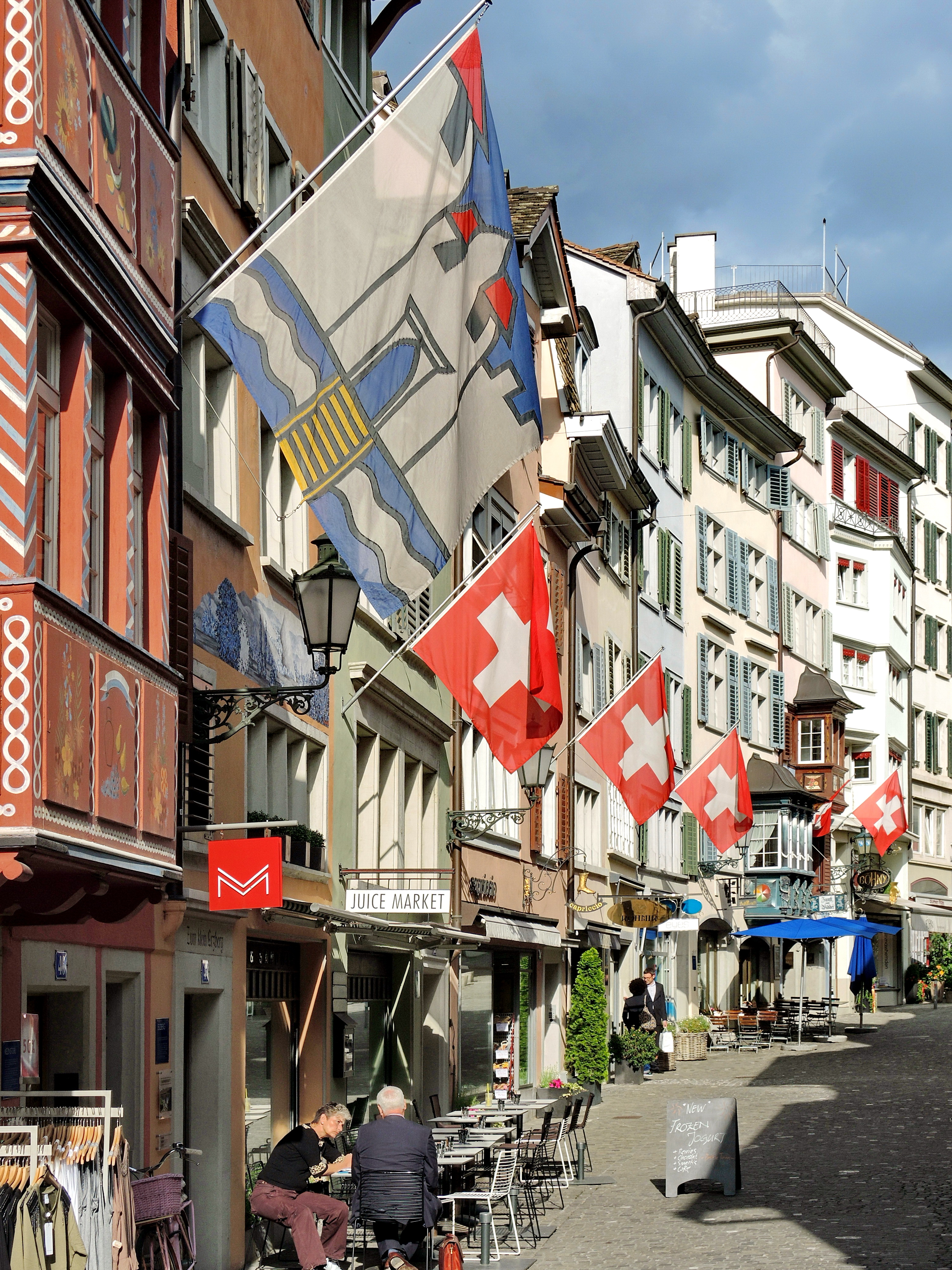 Zunft zum Widder, Augustinergasse in Zürich-Lindenhof (Switzerland)